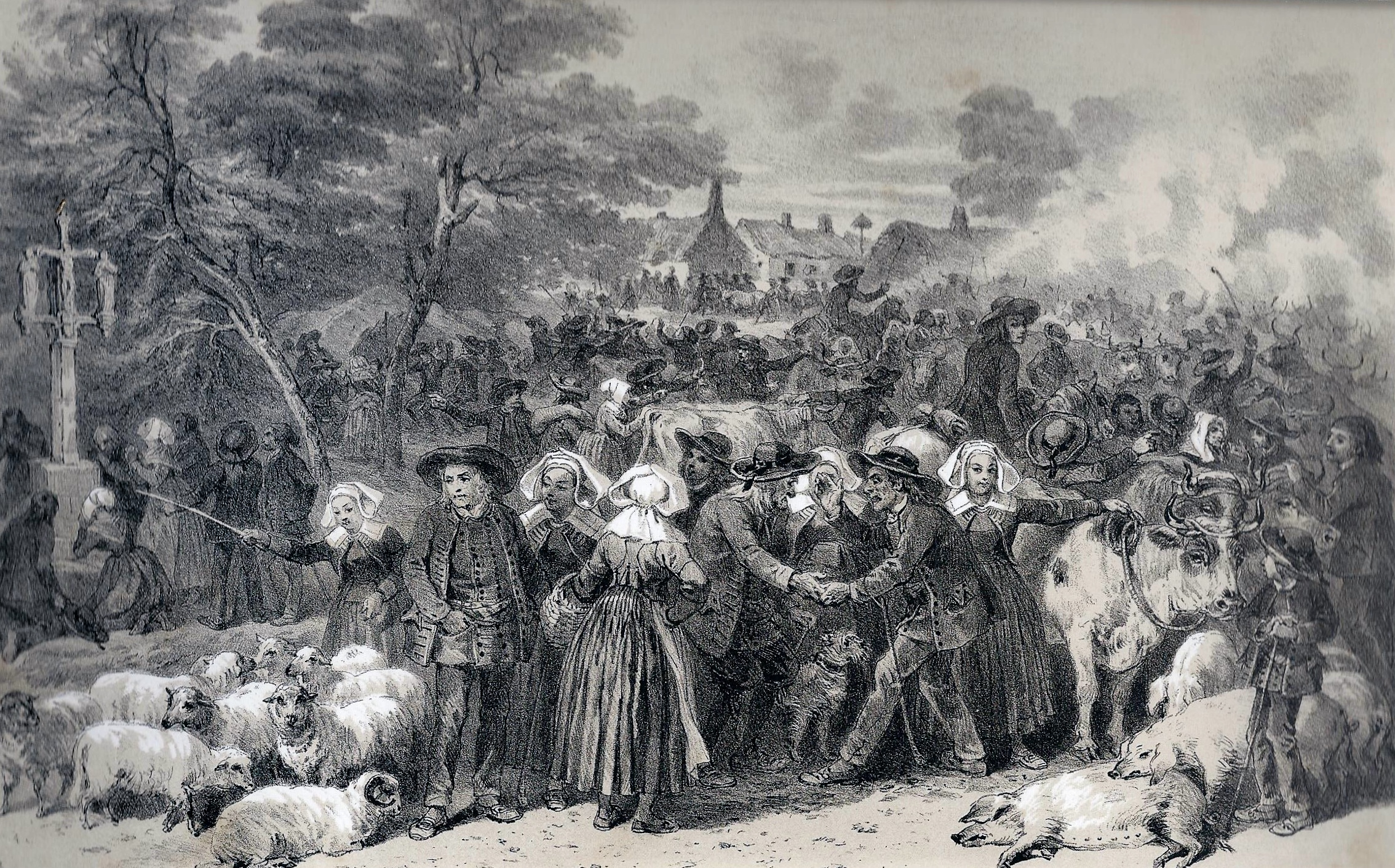 François Hippolyte Lalaisse : La conclusion d'un marché dans le Finistère (Landivisiau et Saint-Thégonnec) (dessin publié dans Félix Benoist, "La Bretagne contemporaine", tome "Finistère", 1867).